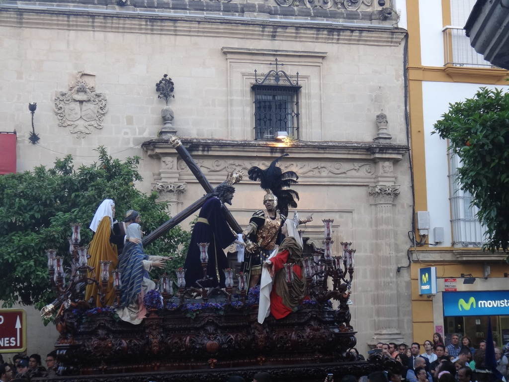 Antiguo Cabildo de Jerez, Jerez de la Frontera (Andalucía, España)